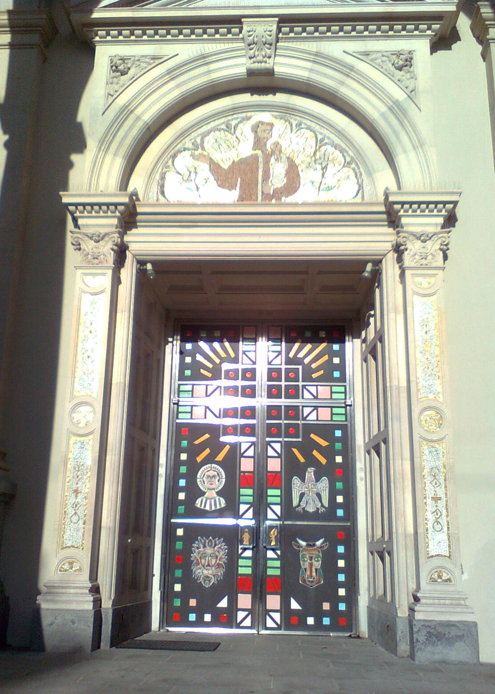 Hauptportal der Josefskirche